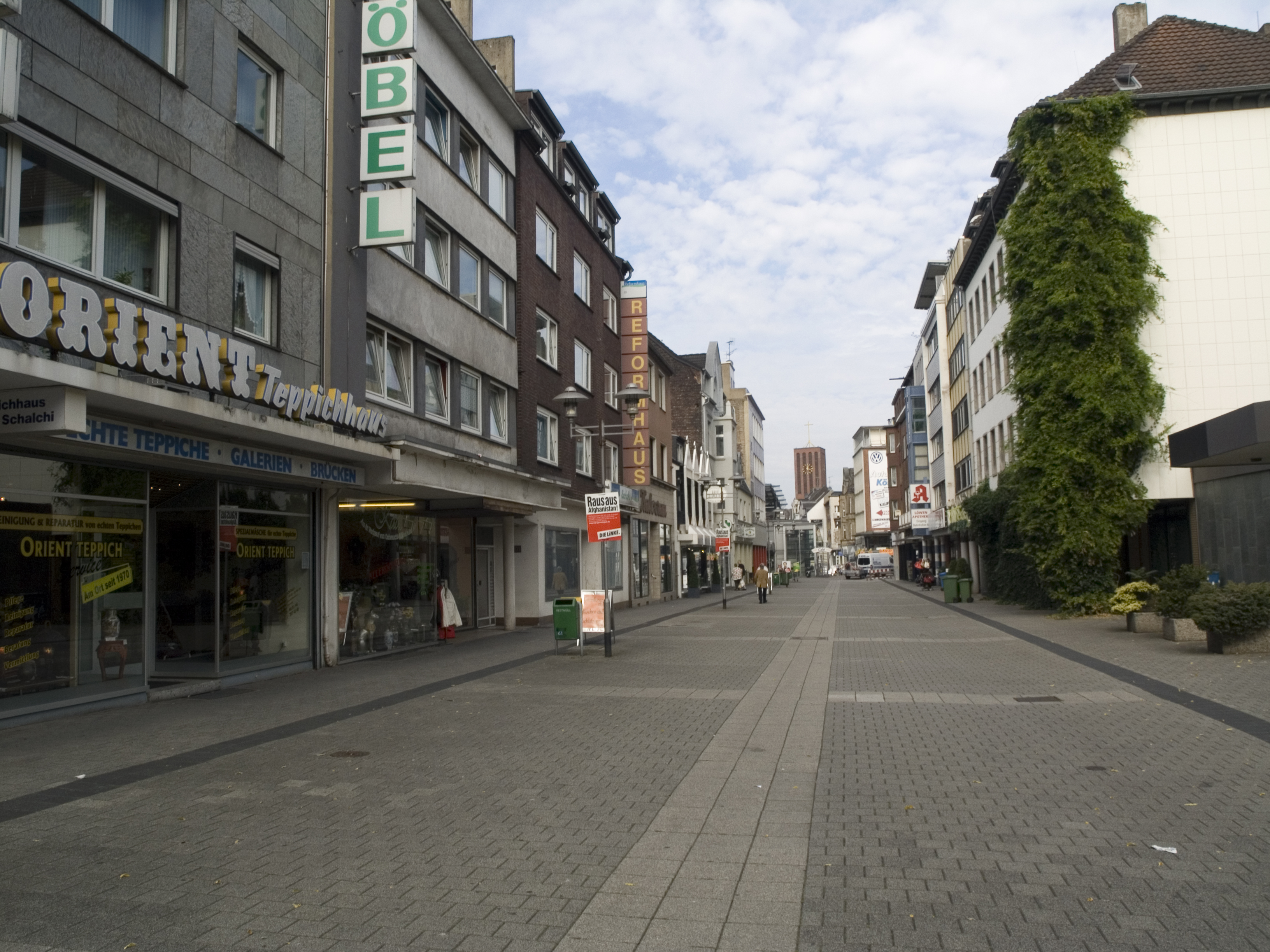 Северный Рейн - Вестфалия, Оберхаузен, Штеркраде - Steinbrinkstrasse